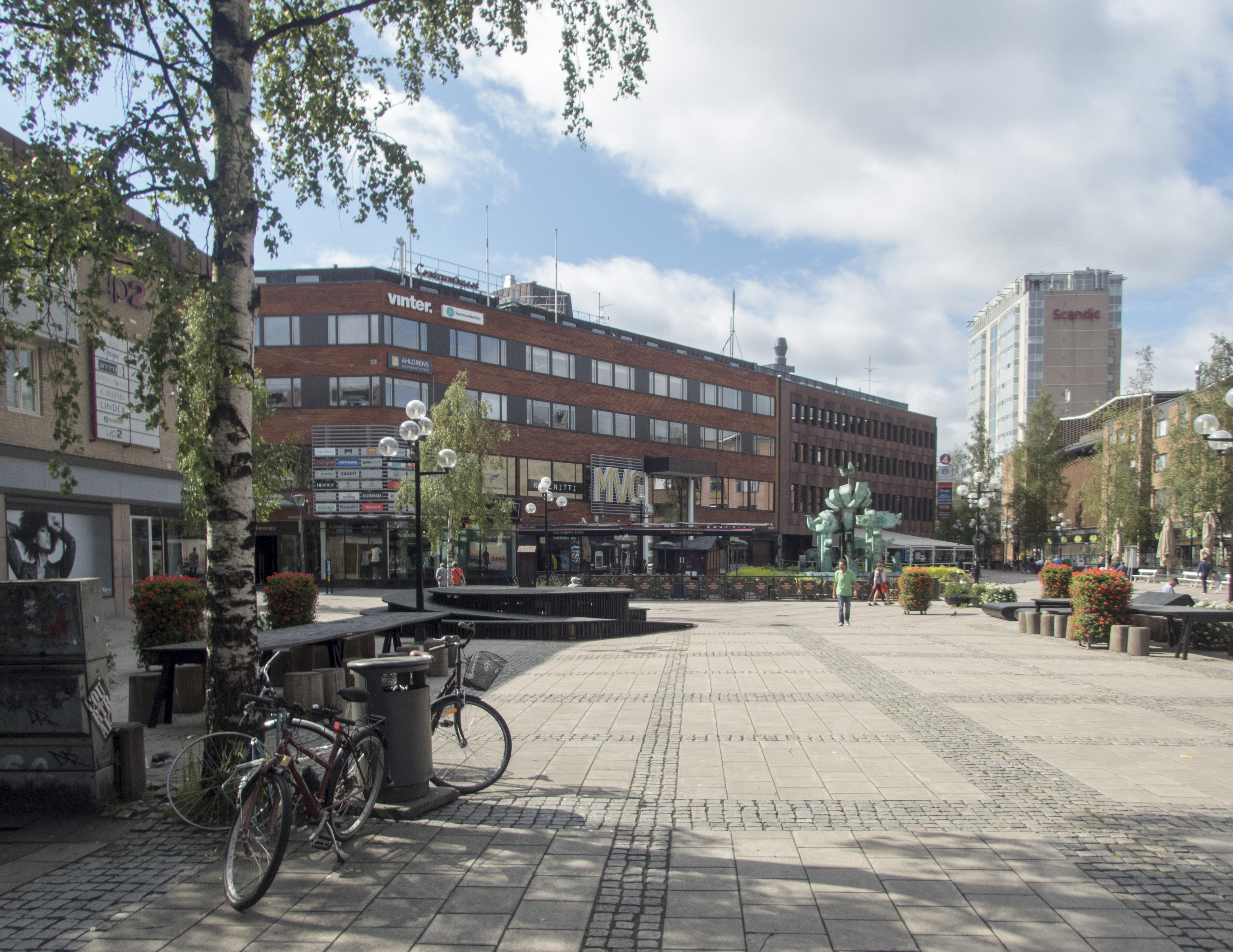 Renmarkstorget, Umeå. Huset i fonden är F d Centrumhuset. Byggnadsår 1960. Arkitekt Erik Thelaus